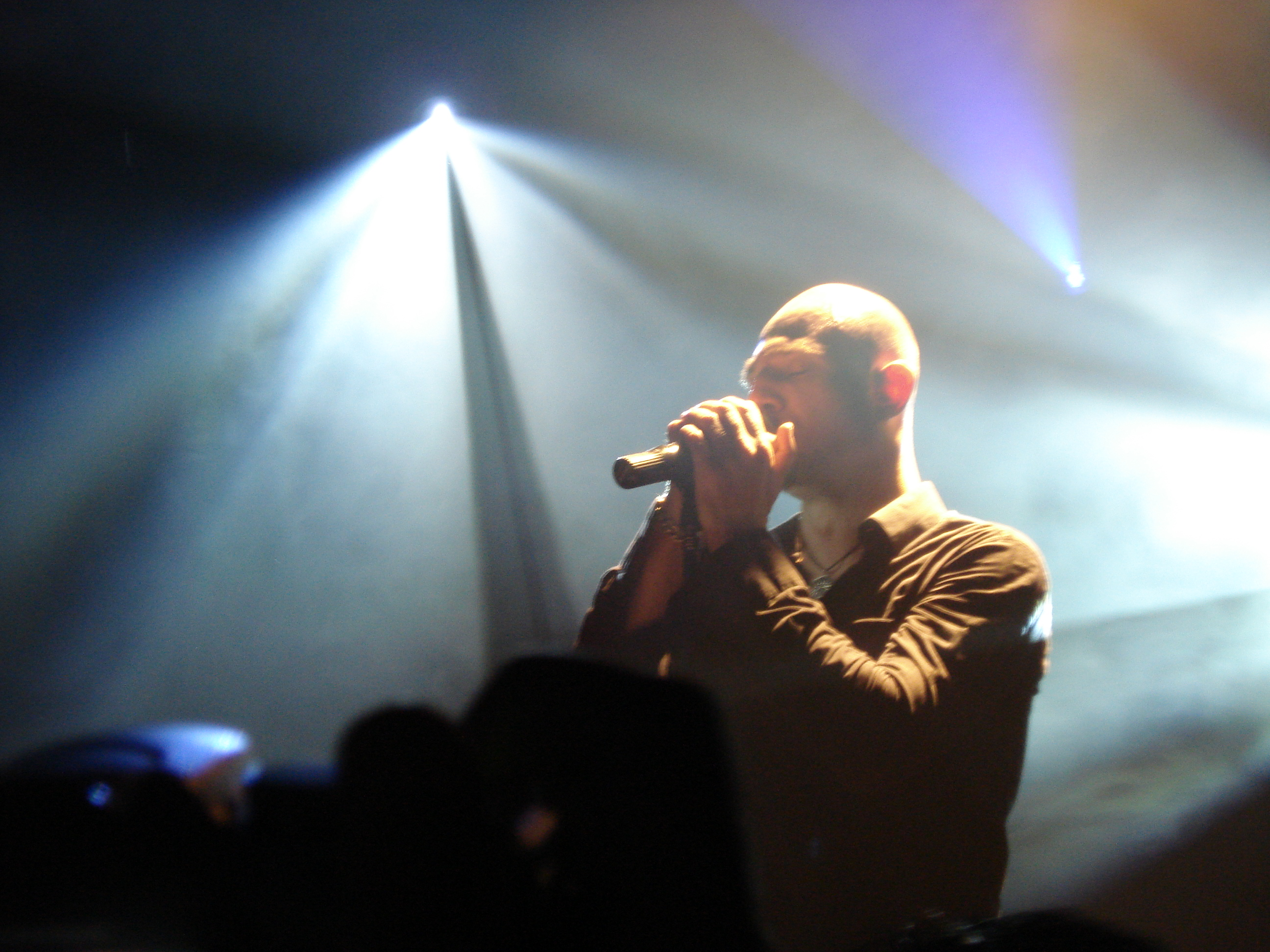 De/Vision en La Trastienda, Buenos Aires, Argentina.